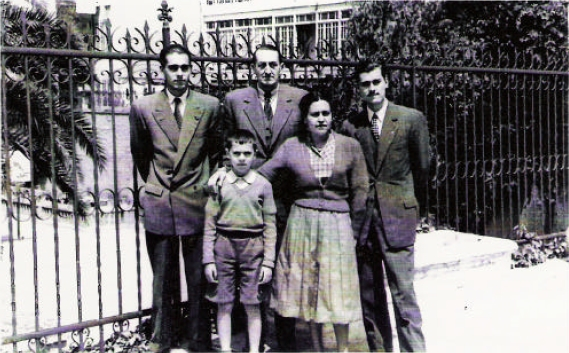 J.M. García-Blanco Oyarzabal. 1952